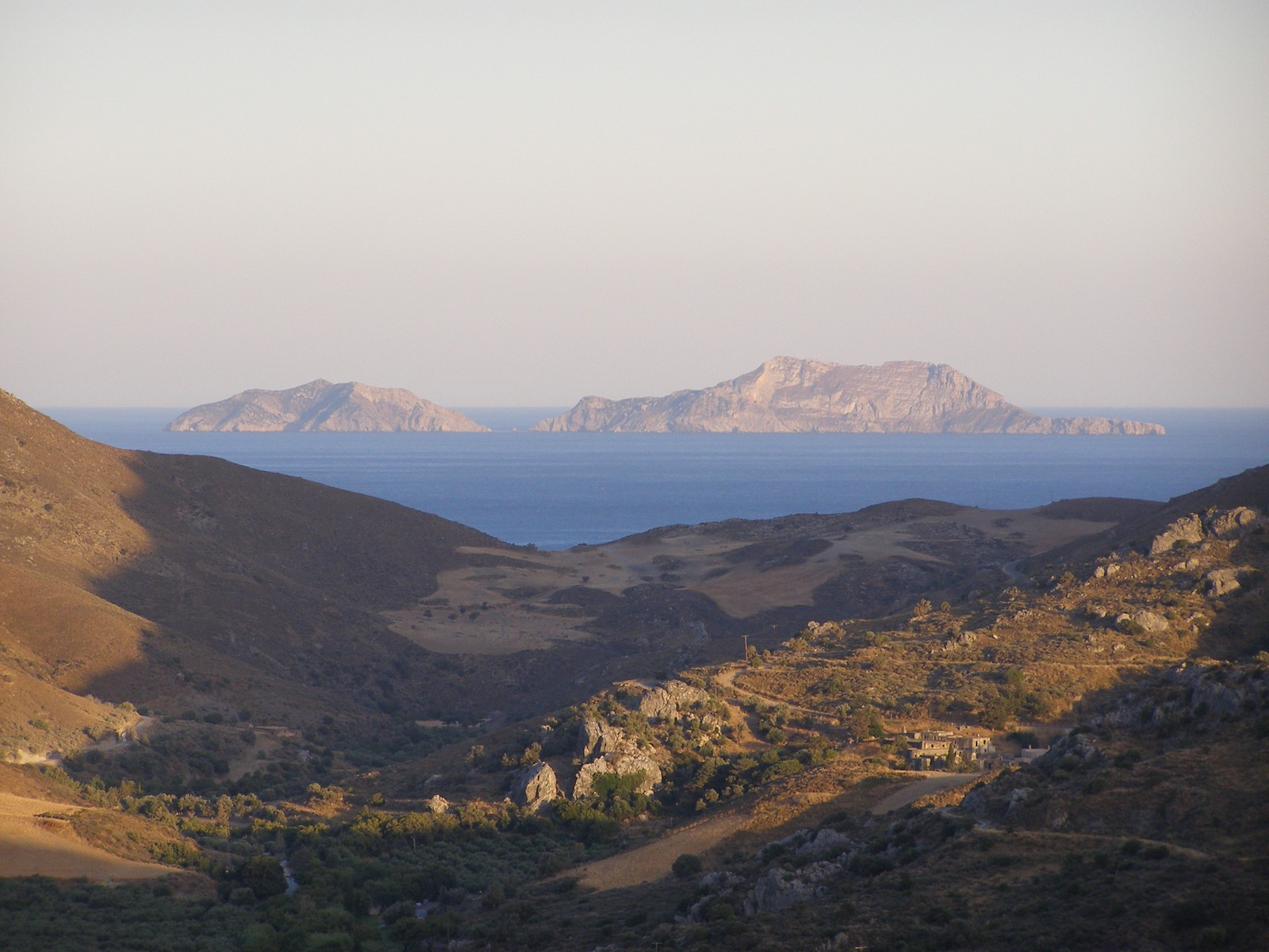 Die Paximadia-Inseln im Libyschen Meer südlich von Kreta, im Vordergrund das alte Kloster Preveli